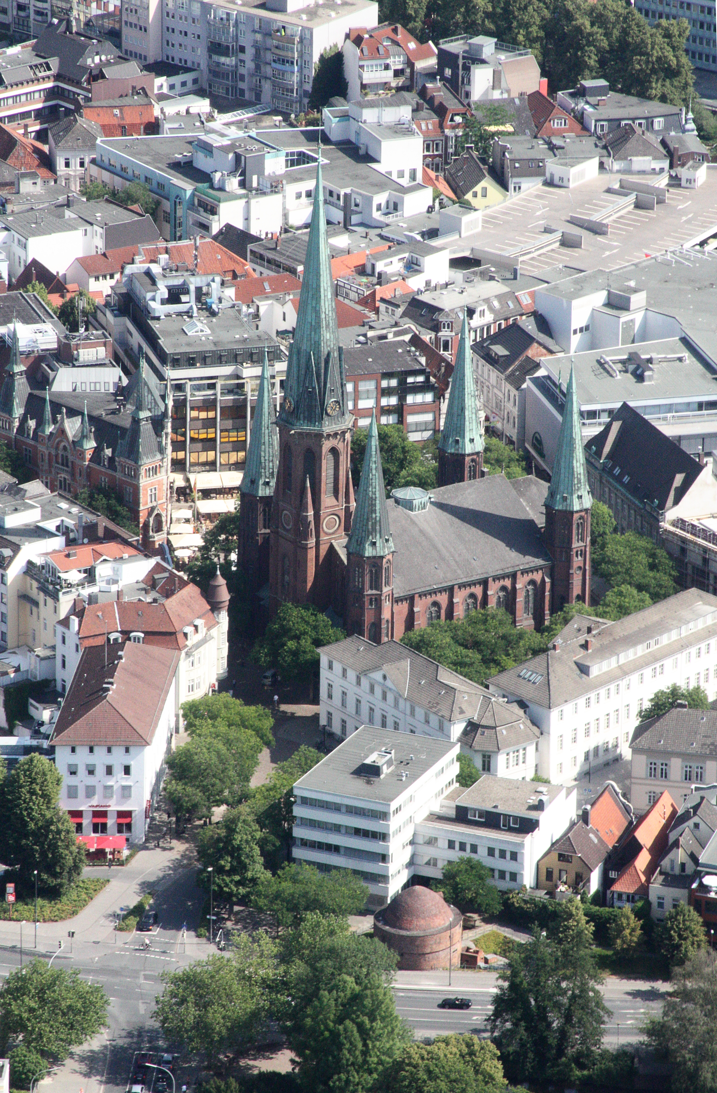 Luftaufnahmen Oldenburg (Oldenburg), mit Weiterflug nach Westen; 1500 Fuß Flughöhe; Juli 2010; Originalfoto bearbeitet: Tonwertkorrektur und Bild geschärft mit Hochpassfilter